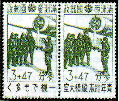 満州国が航空機購入資金募金のために発行しようとした寄附金付き切手。ただし満州国自体が滅亡した為発行されなかった